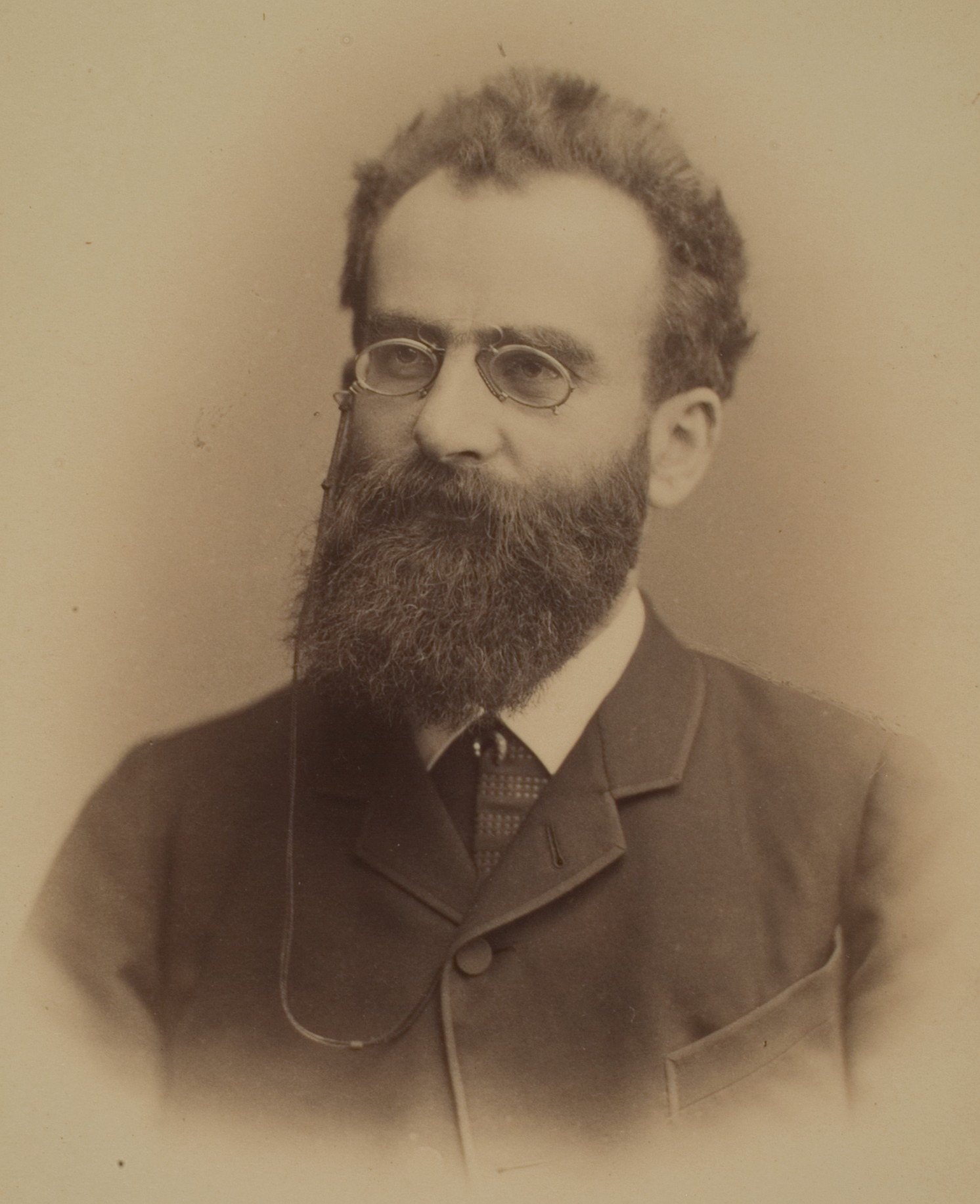 Fritz Schöll (1850–1919), deutscher Klassischer Philologe, 1877–1918 Professor an der Universität Heidelberg. Visitenkarte